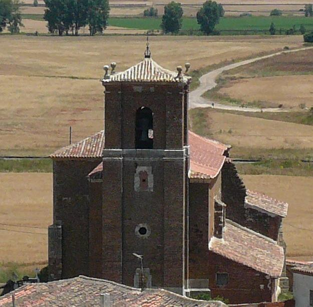 Detalle de la torre de la Iglesia, reconstruida en el siglo XVII